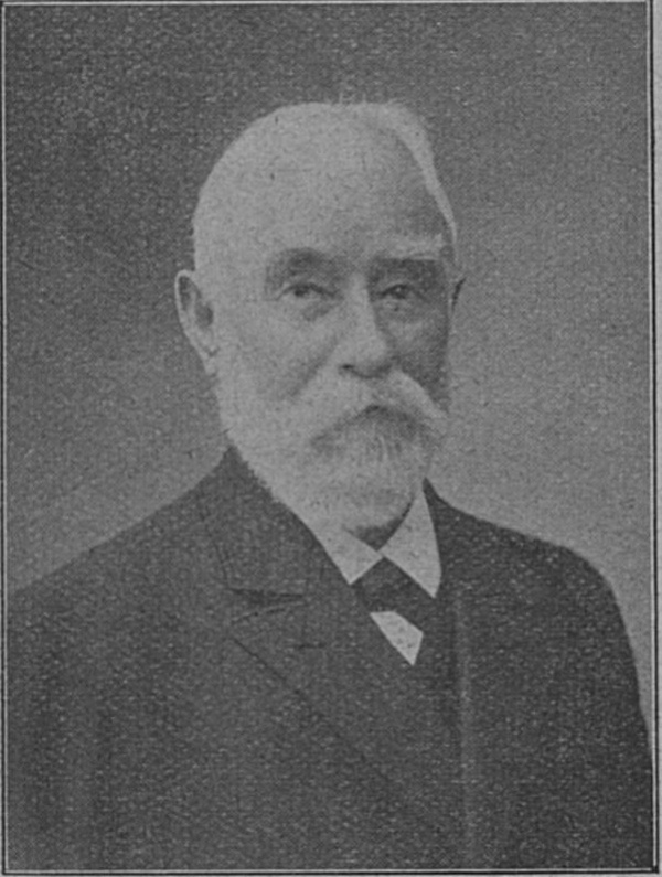 Kauppaneuvos Feodor Sergejeff